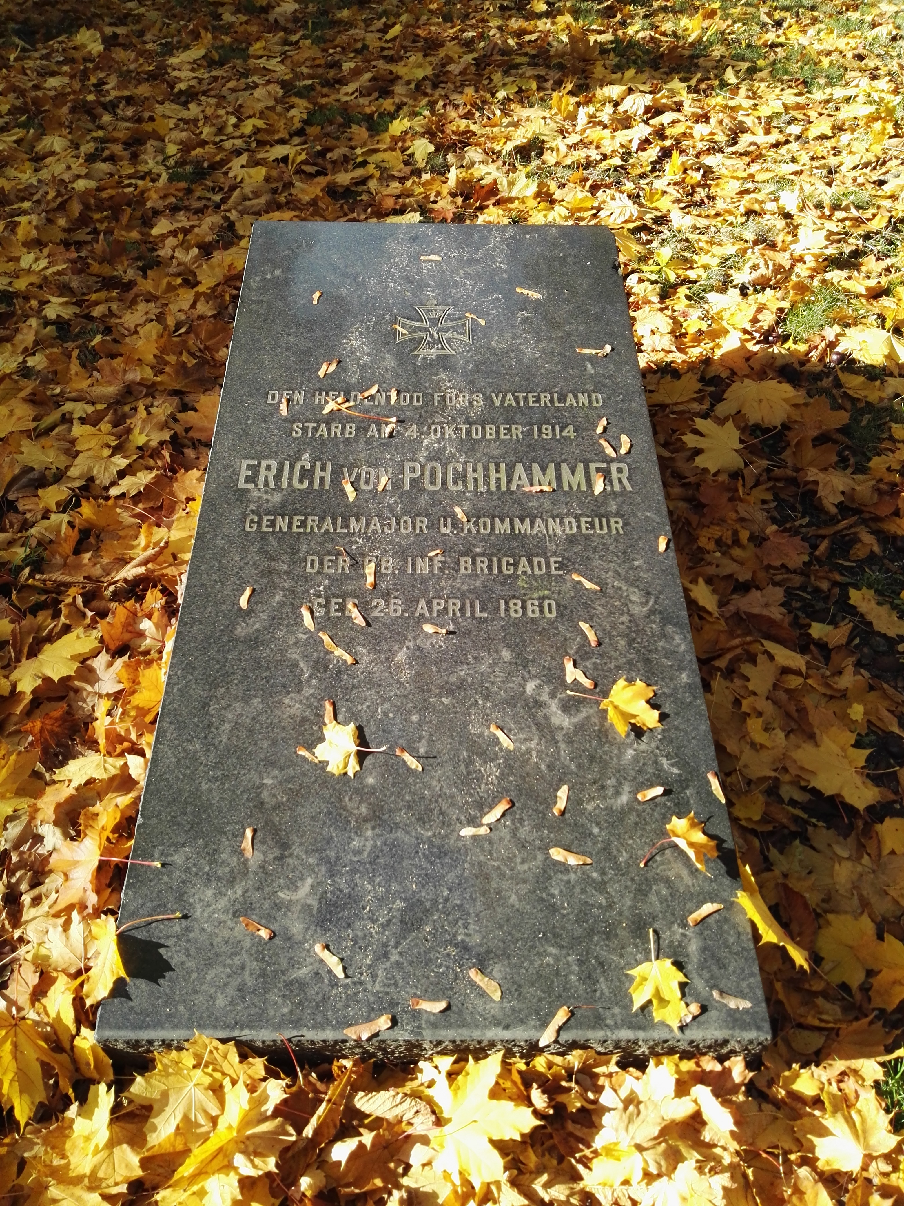 Grab von Erich von Pochhammer auf dem Alten Garnisonfriedhof in Berlin-Mitte